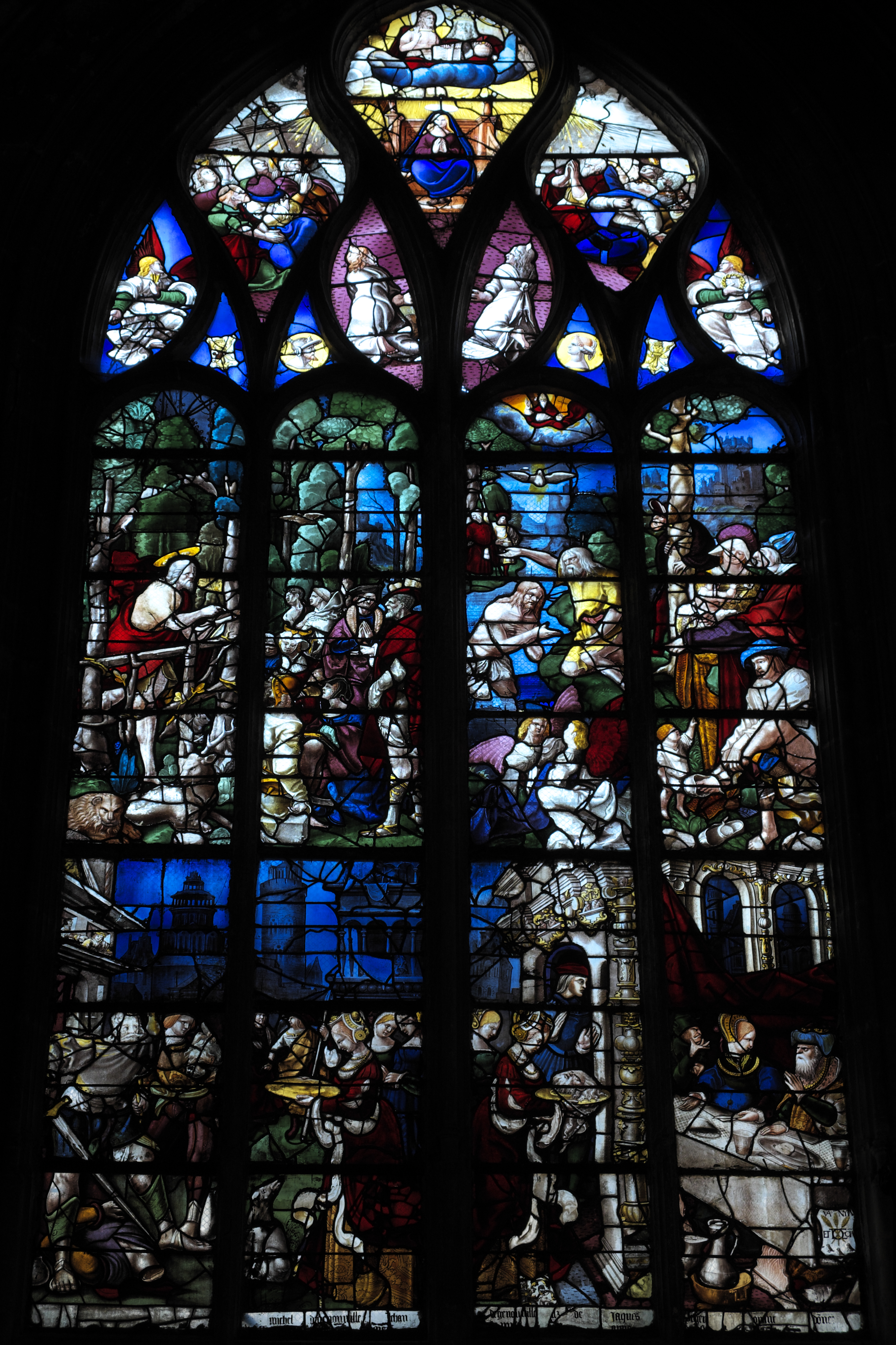 Katholische Kirche Saint-Ouen in Pont-Audemer im Département Eure (Haute-Normandie/Frankreich), Bleiglasfenster aus dem 16. Jahrhundert, Darstellung: Szenen aus dem Leben von Johannes dem Täufer